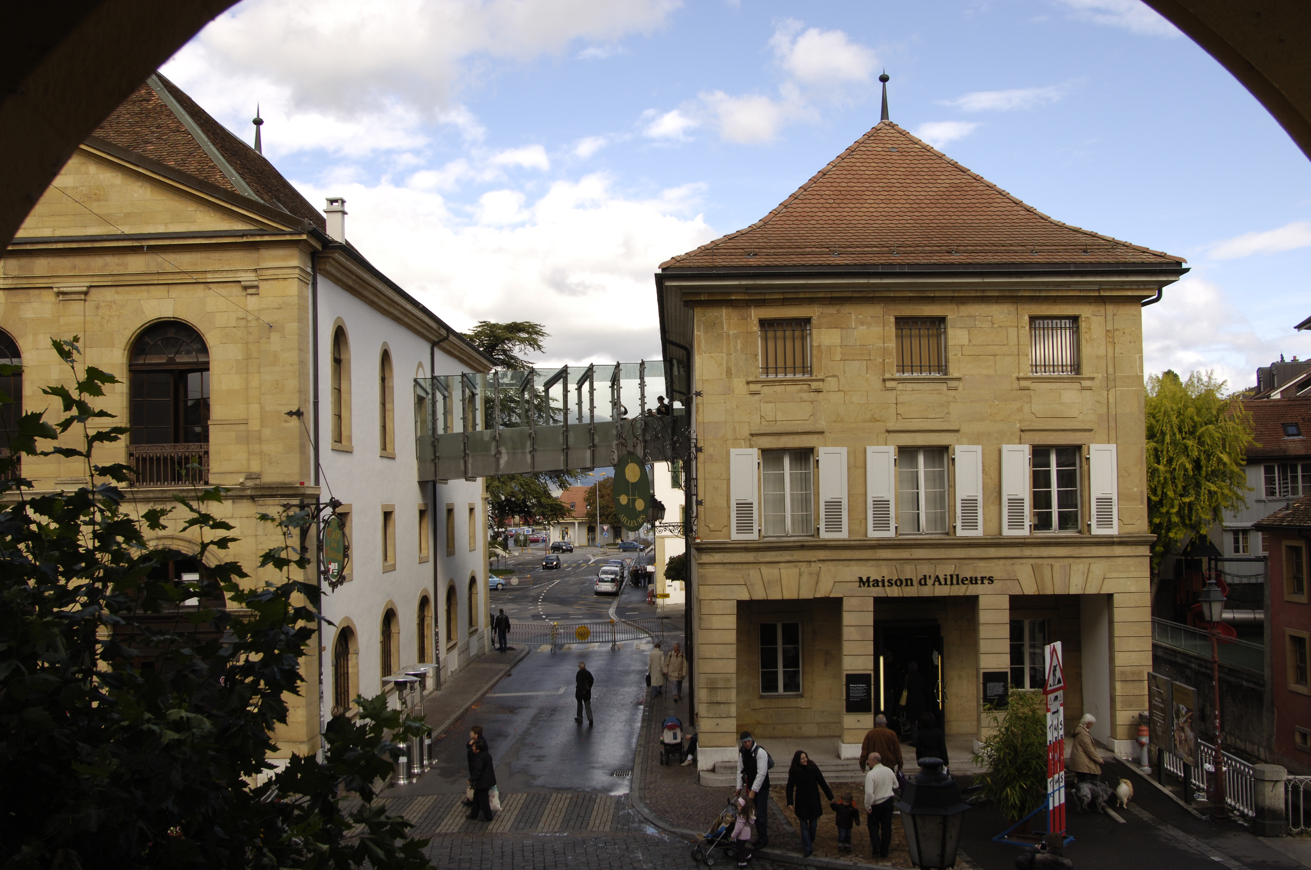 Vue extérieure du musée